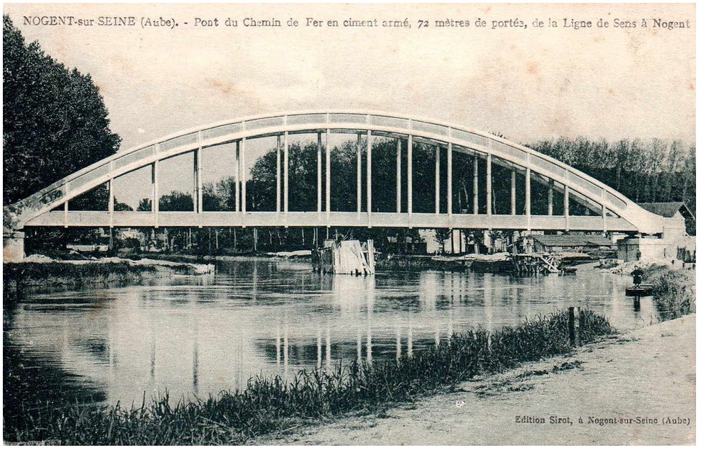 Pont à Nogent-sur-Seine sur la ligne de Nogent à Sens. 10400 Nogent-sur-Seine. Construit en 1928, il a été détruit en 1940 par l'armée française.